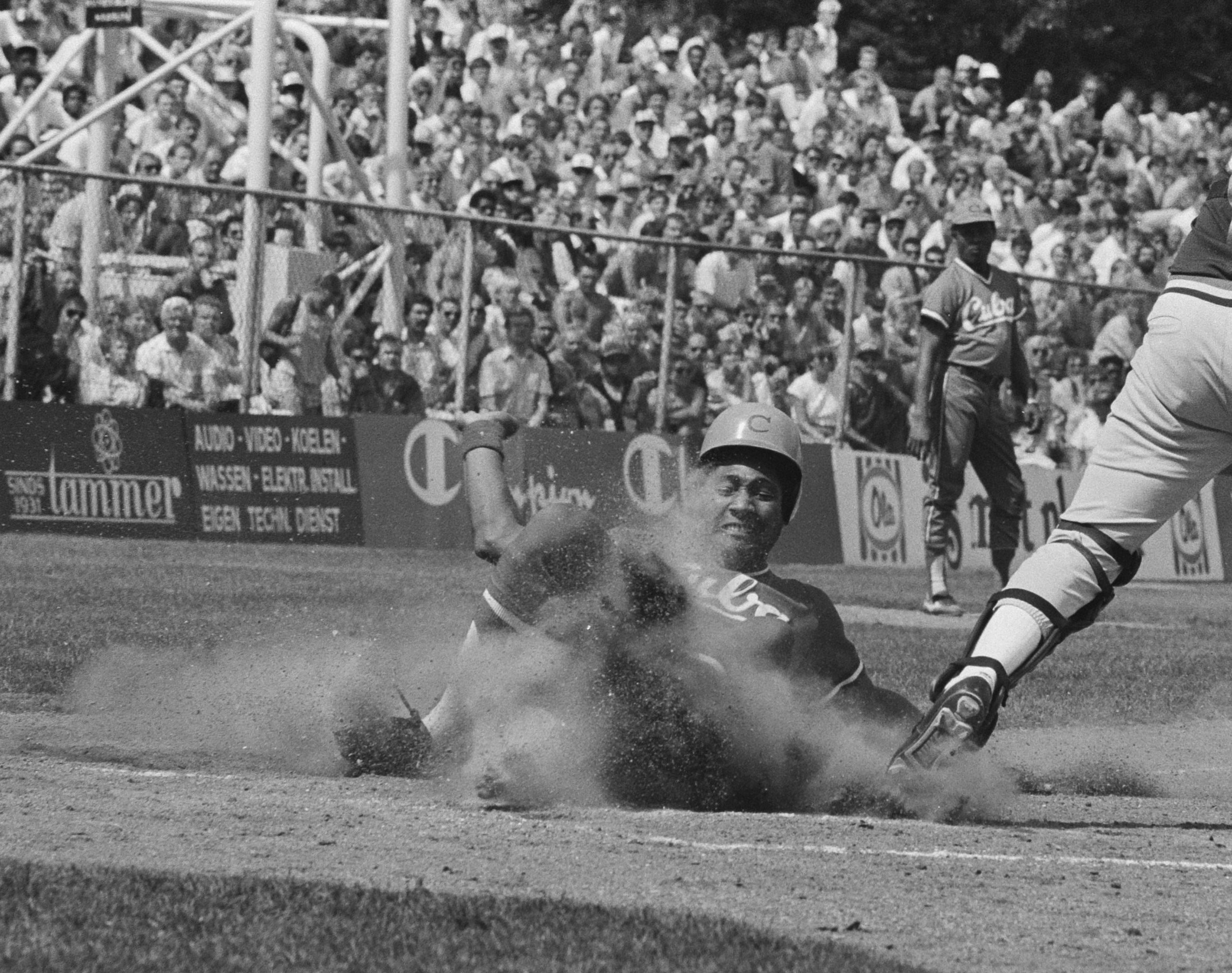 Wereldkampioenschappen honkbal in Haarlem tussen Cuba en Puerto Rico; Lourdes Gurriel scoort voor Cuba zesde punt (...)